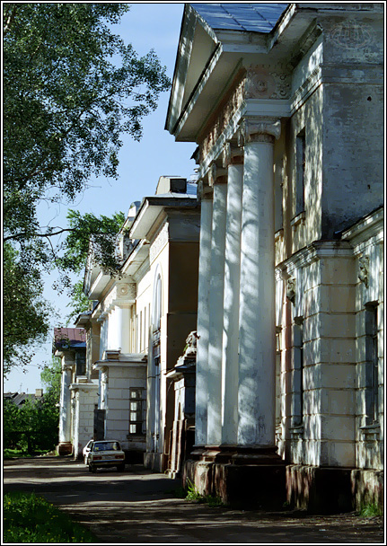 Больница в городе Вичуга